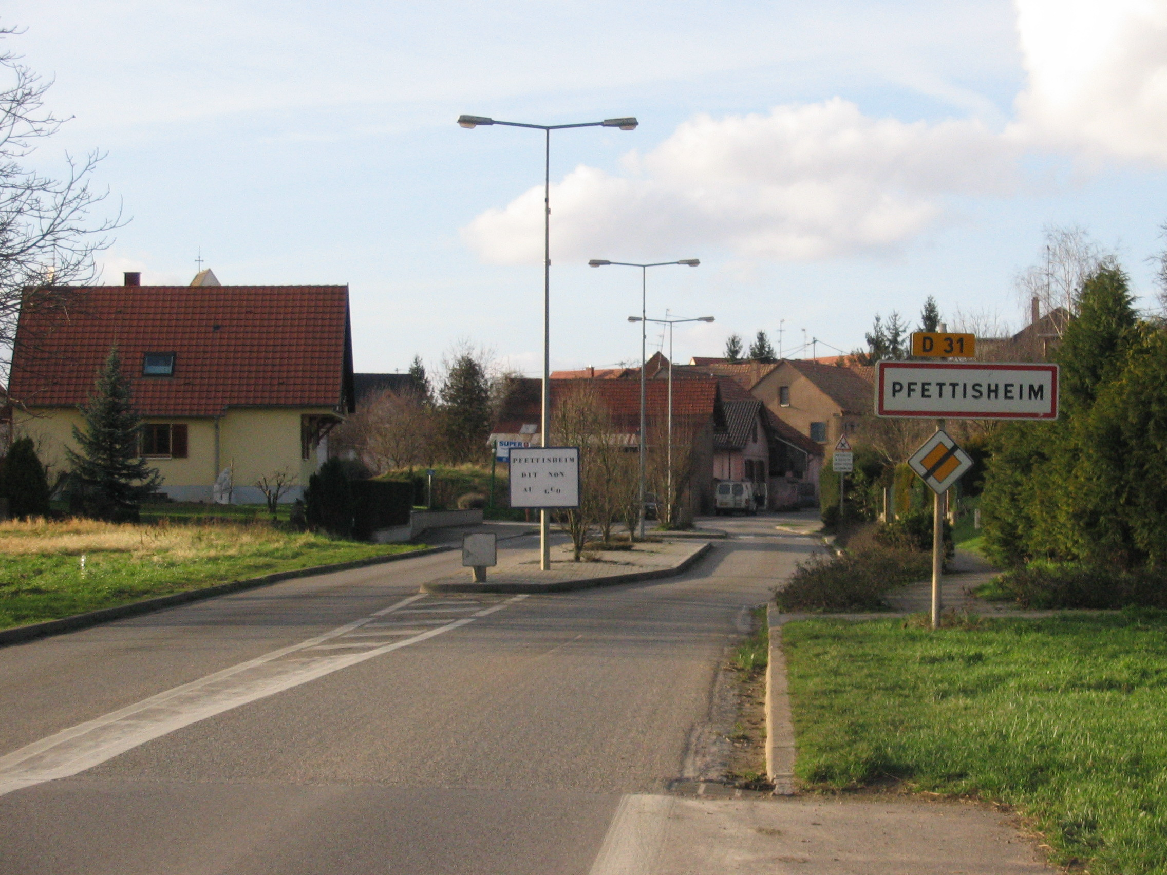 entrée du village de Pfettisheim (Bas-Rhin)